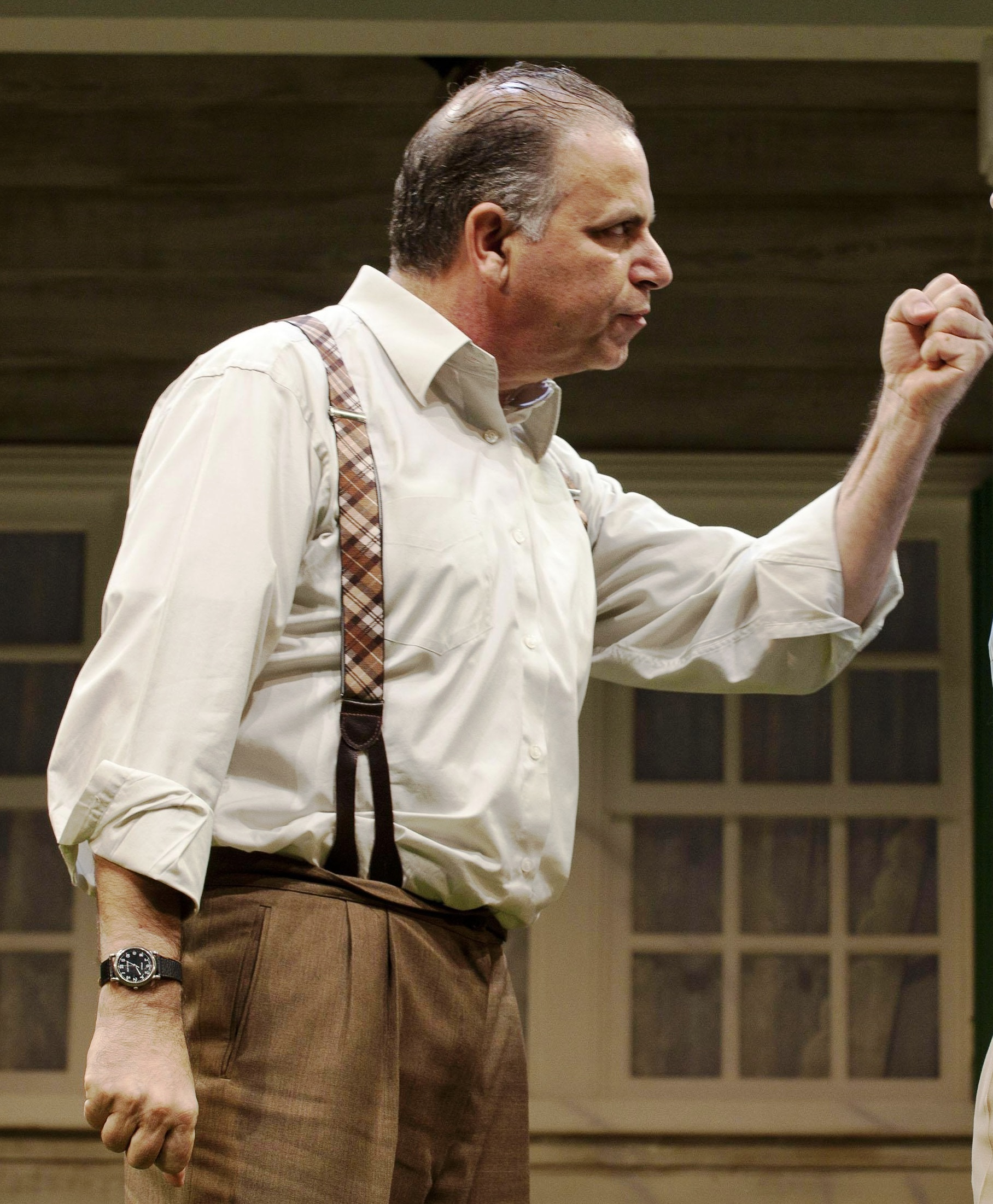 נתן דטנר בהצגה "כולם היו בניי" מאת ארתור מילר, בבימויו של משה נאור, קופרודוקציה של תיאטראות הקאמרי וחיפה, 2011